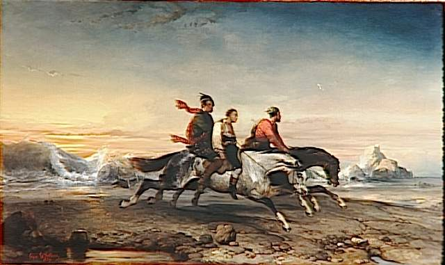 Combat naval le languedoc contre un vaisseau anglais